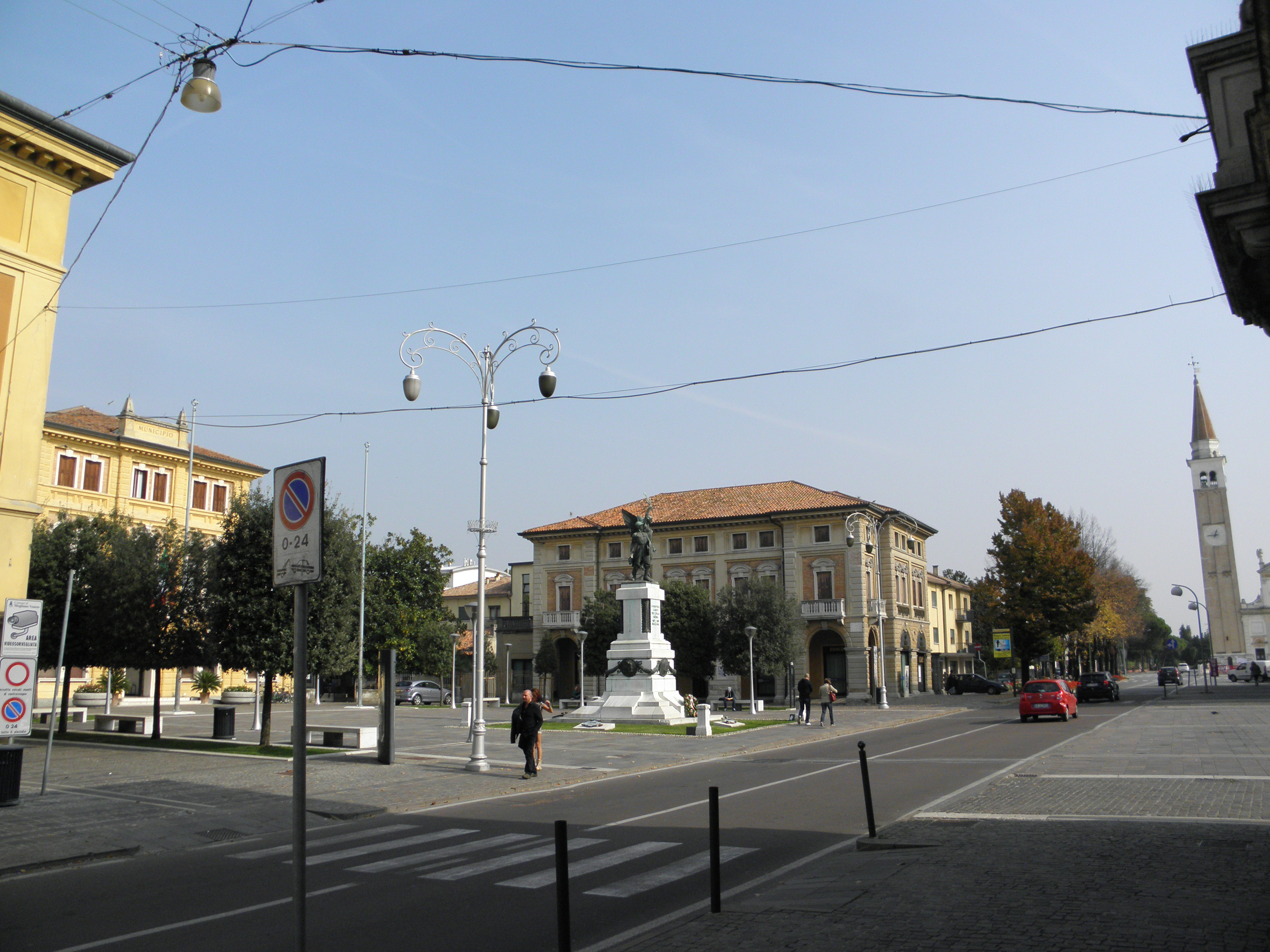 Mogliano Veneto, Piazza Caduti: il monumento ai caduti e parte del palazzo municipale.